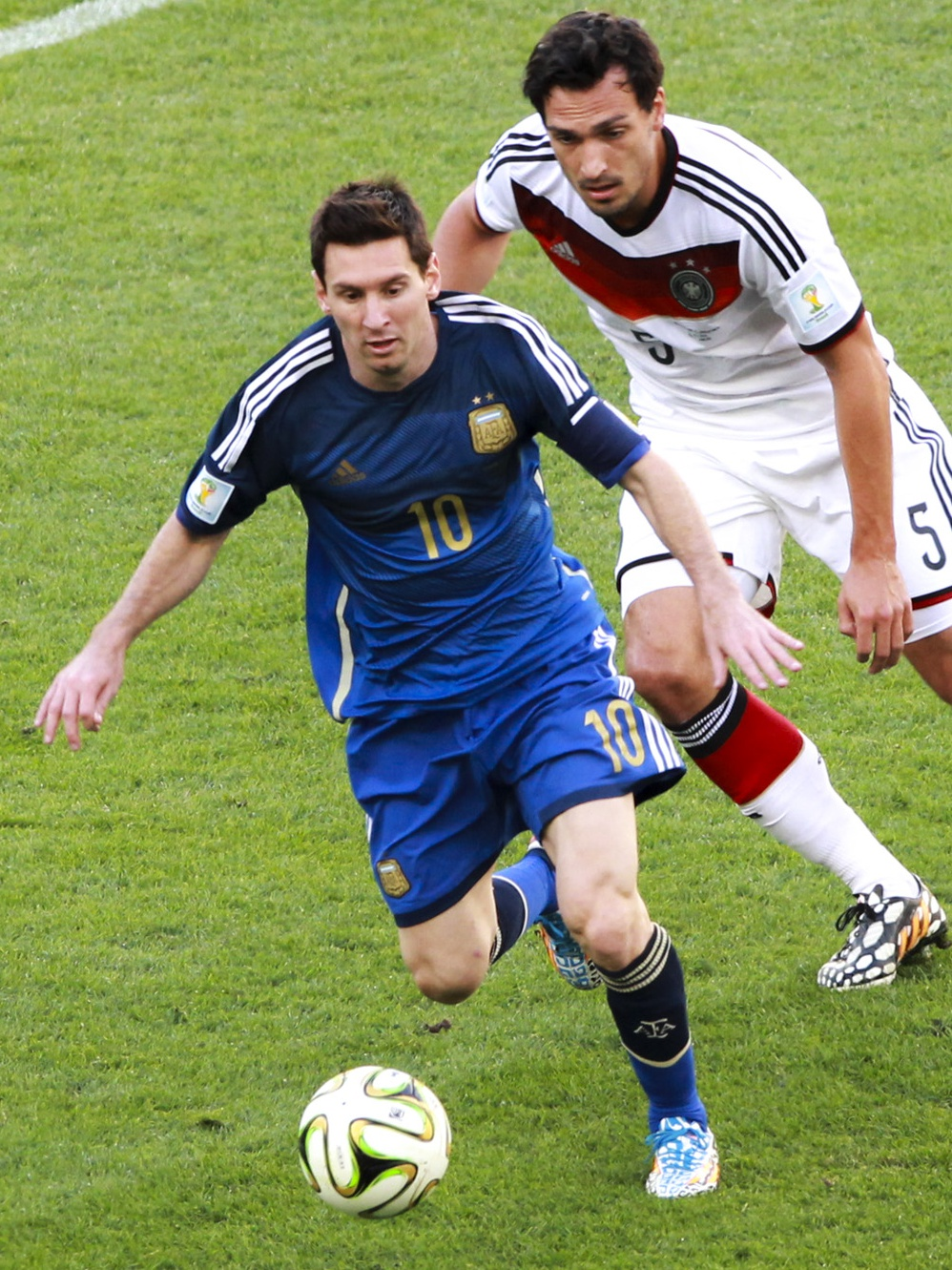 Lionel Messi and Mats Hummels in the final match of World Cup 2014 between Germany and Argentina 2014-07-13